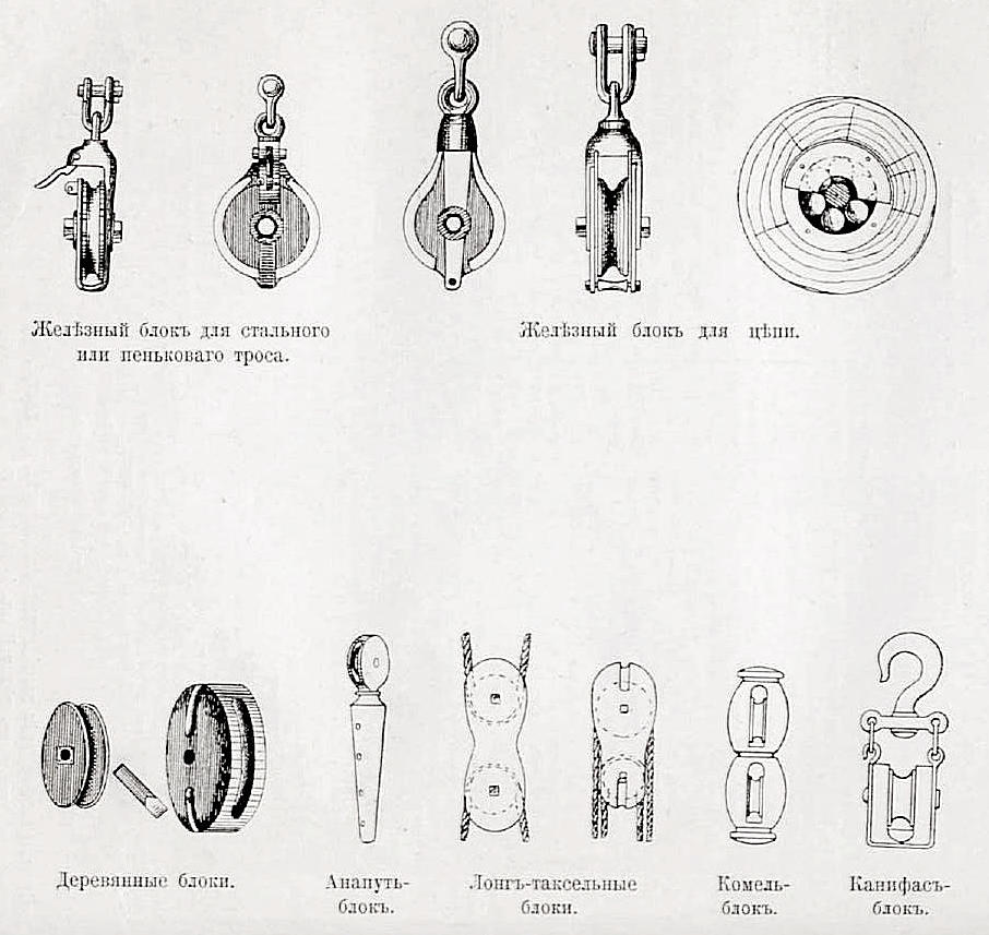 Данное изображение было использовано в статье «Блок» опубликованной в четвёртом томе «Военной энциклопедии», который был издан книгоиздательским товариществом Ивана Дмитриевича Сытина в 1911 году в столице Российской империи городе Санкт-Петербурге.